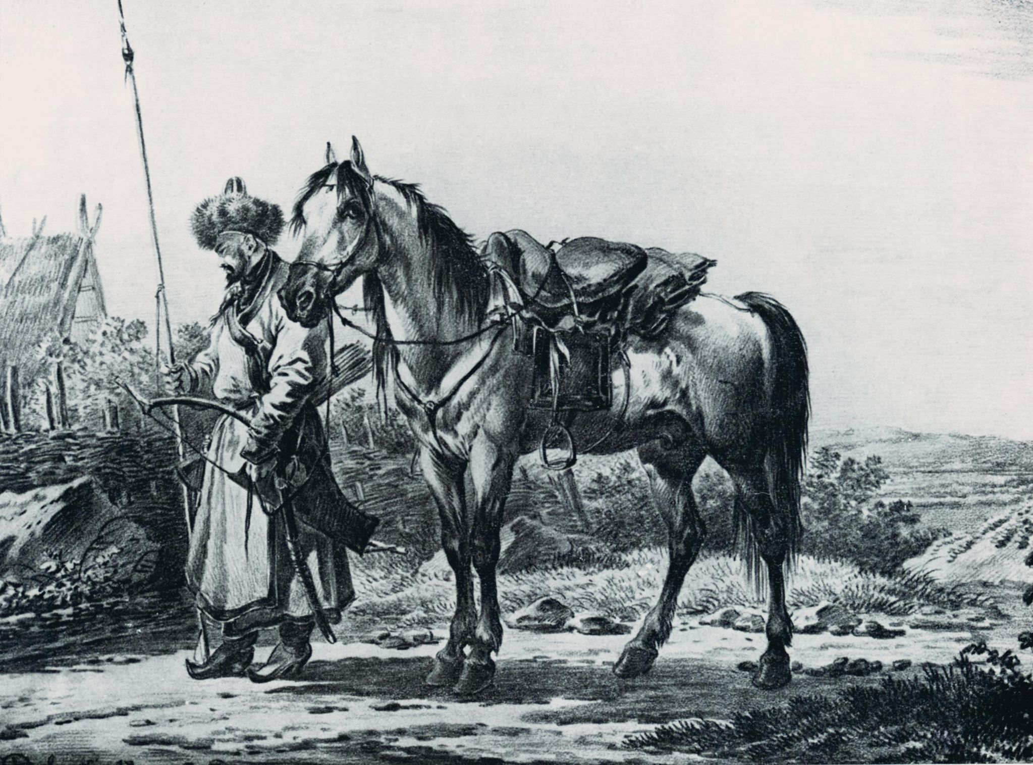 Башкир. Орловский А.О., нач. 19 века.